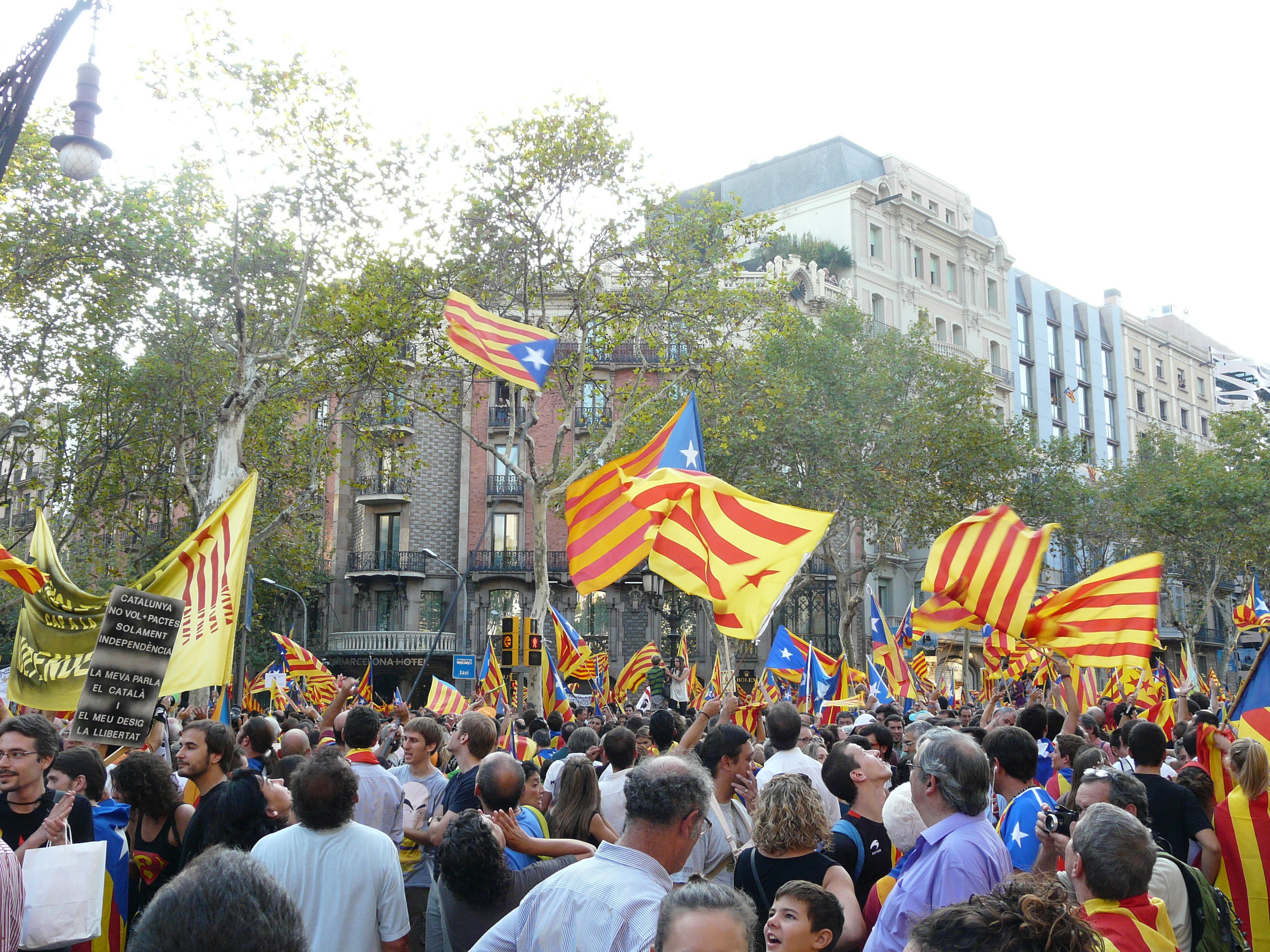 Casa Enric Batlló (Barcelona) Object location41° 23′ 37.88″ N, 2° 09′ 44.03″ E